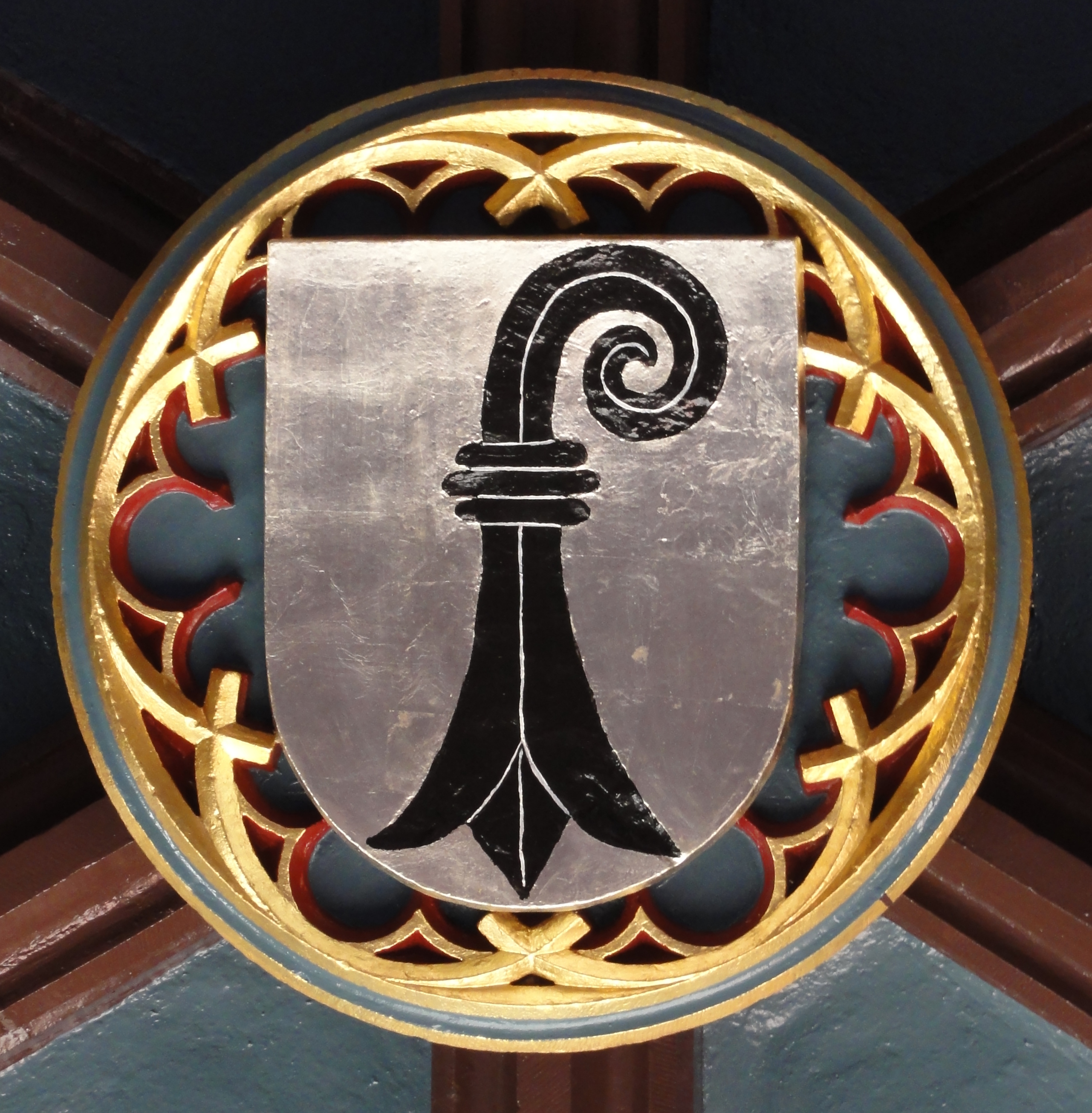 Basel Stadt — Baselstab im Gewölbe des Rathauses